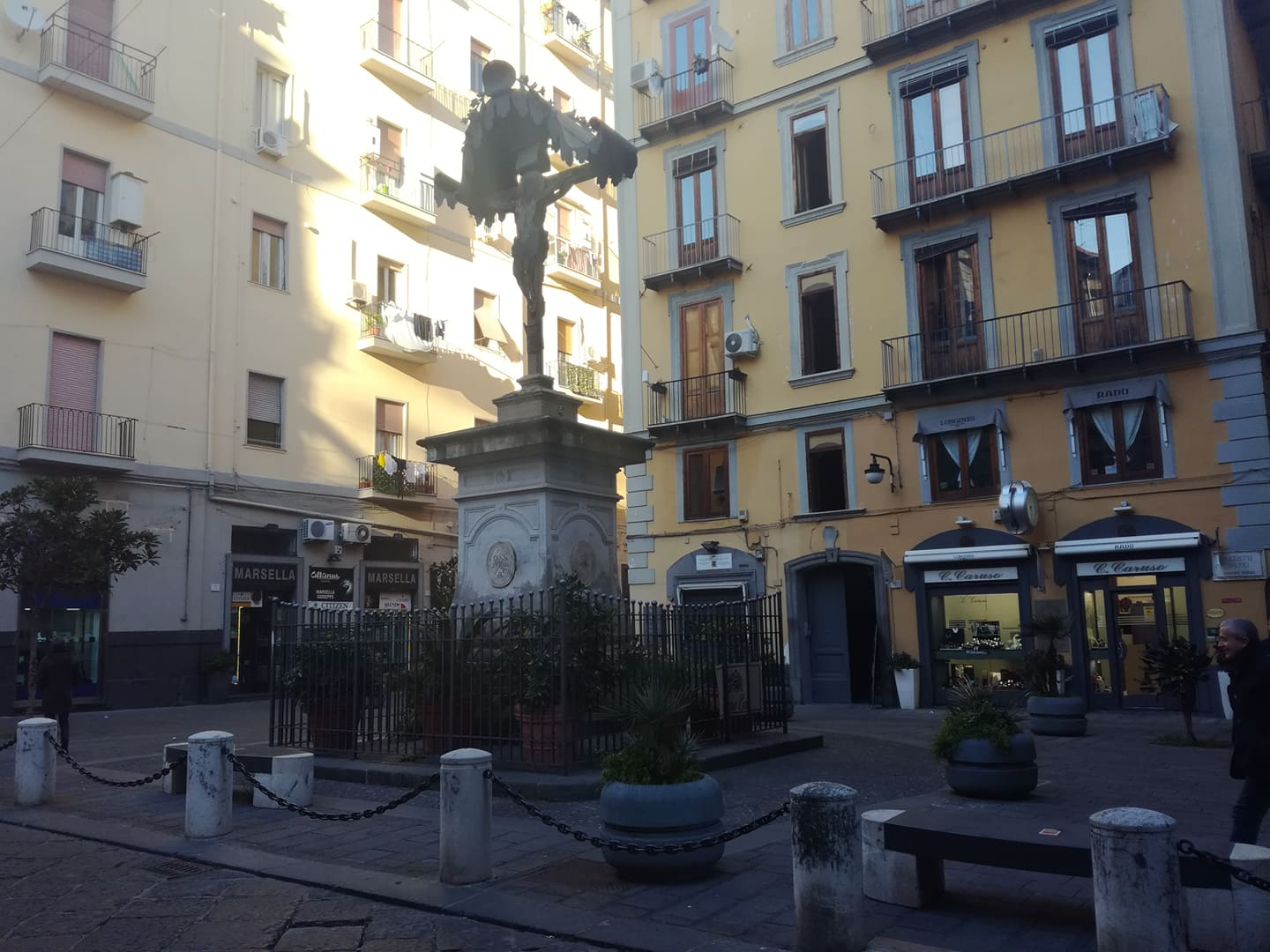 Borgo Orefici (Napoli)